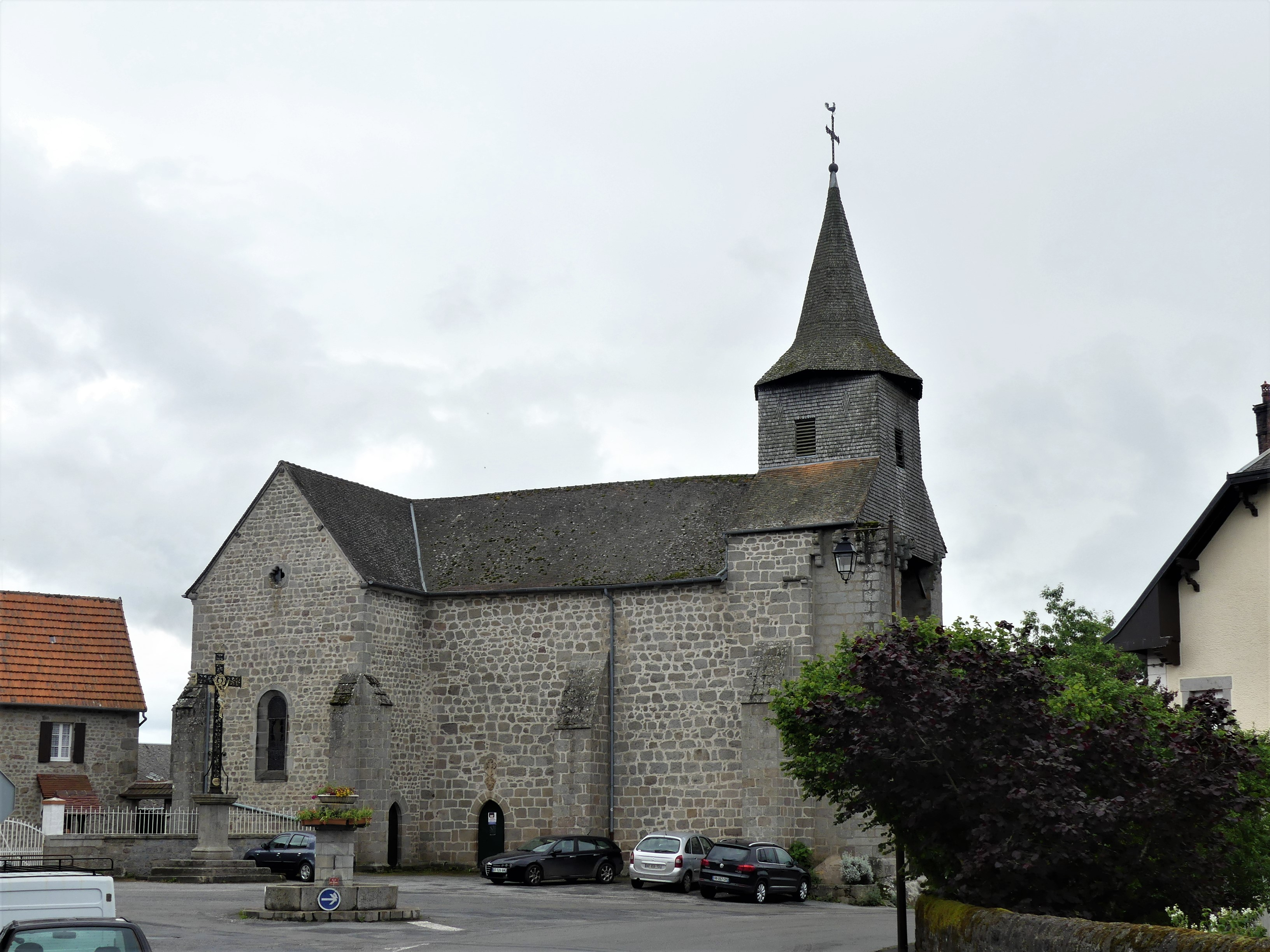 L'église de Champagnat, Creuse, France.